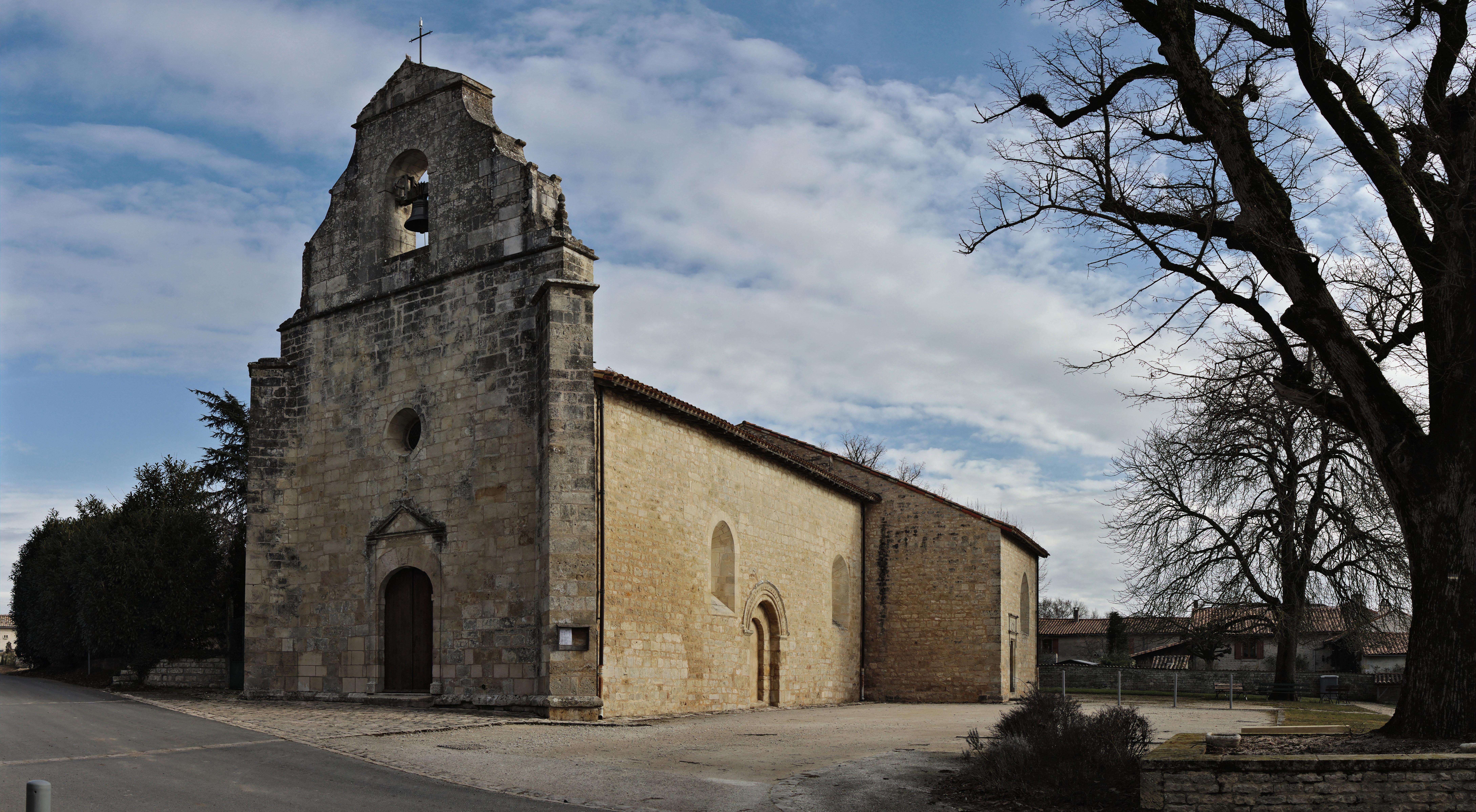 Église Saint-Sulpice, Tillou, Deux-Sèvres, Poitou-Charentes, France